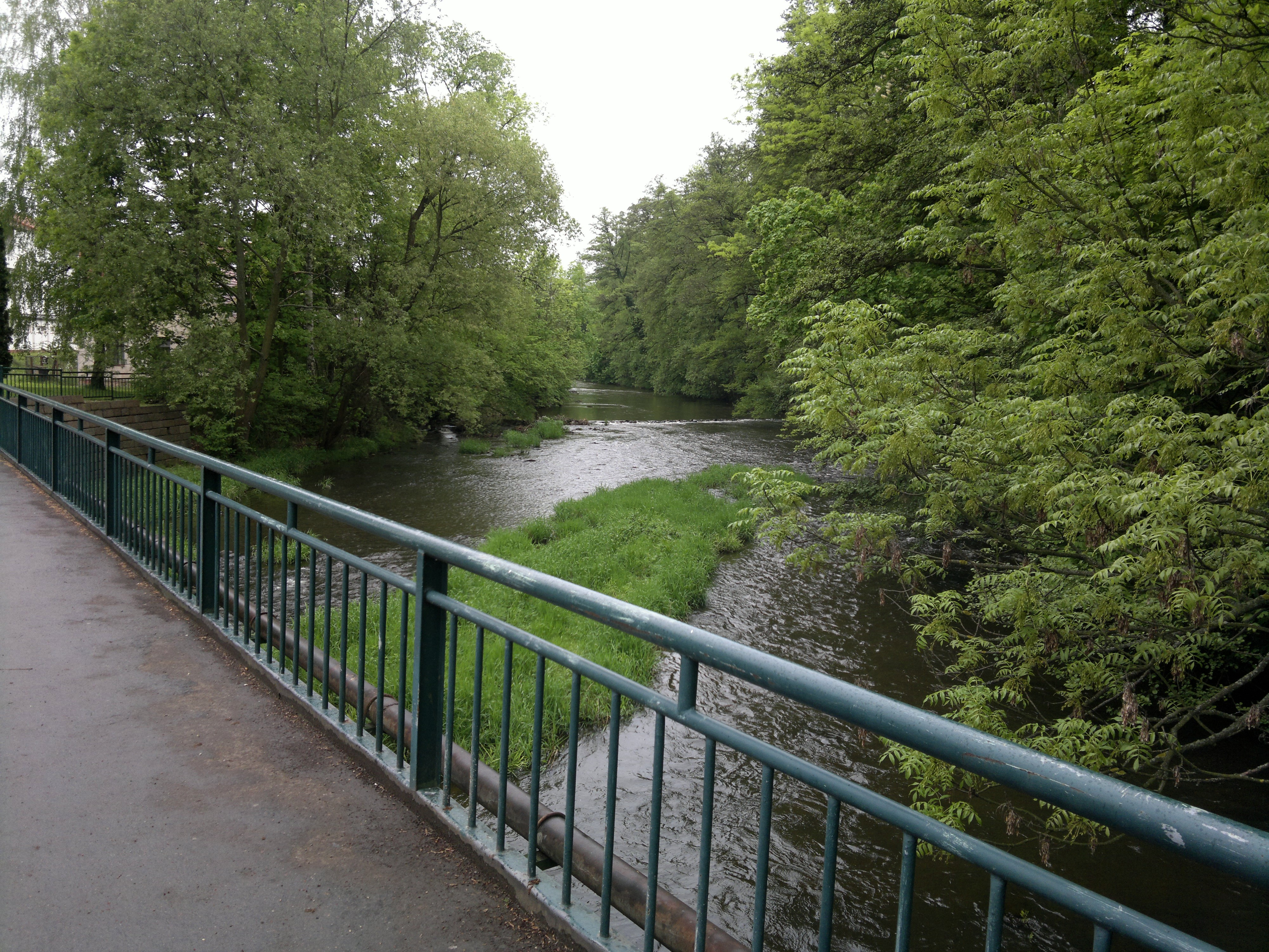 Chrudimka ve Slatiňanech v okrese Chrudim